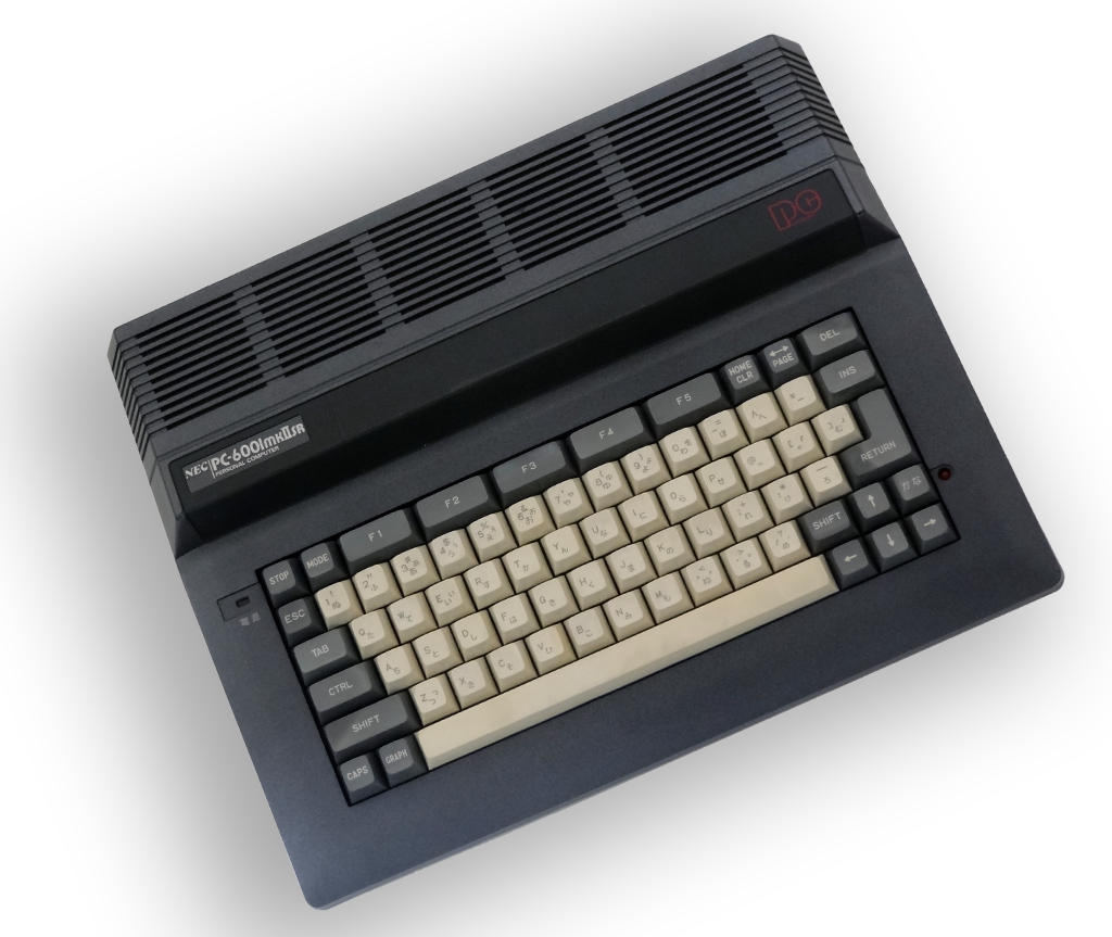 PC-6001mkIISR本体写真